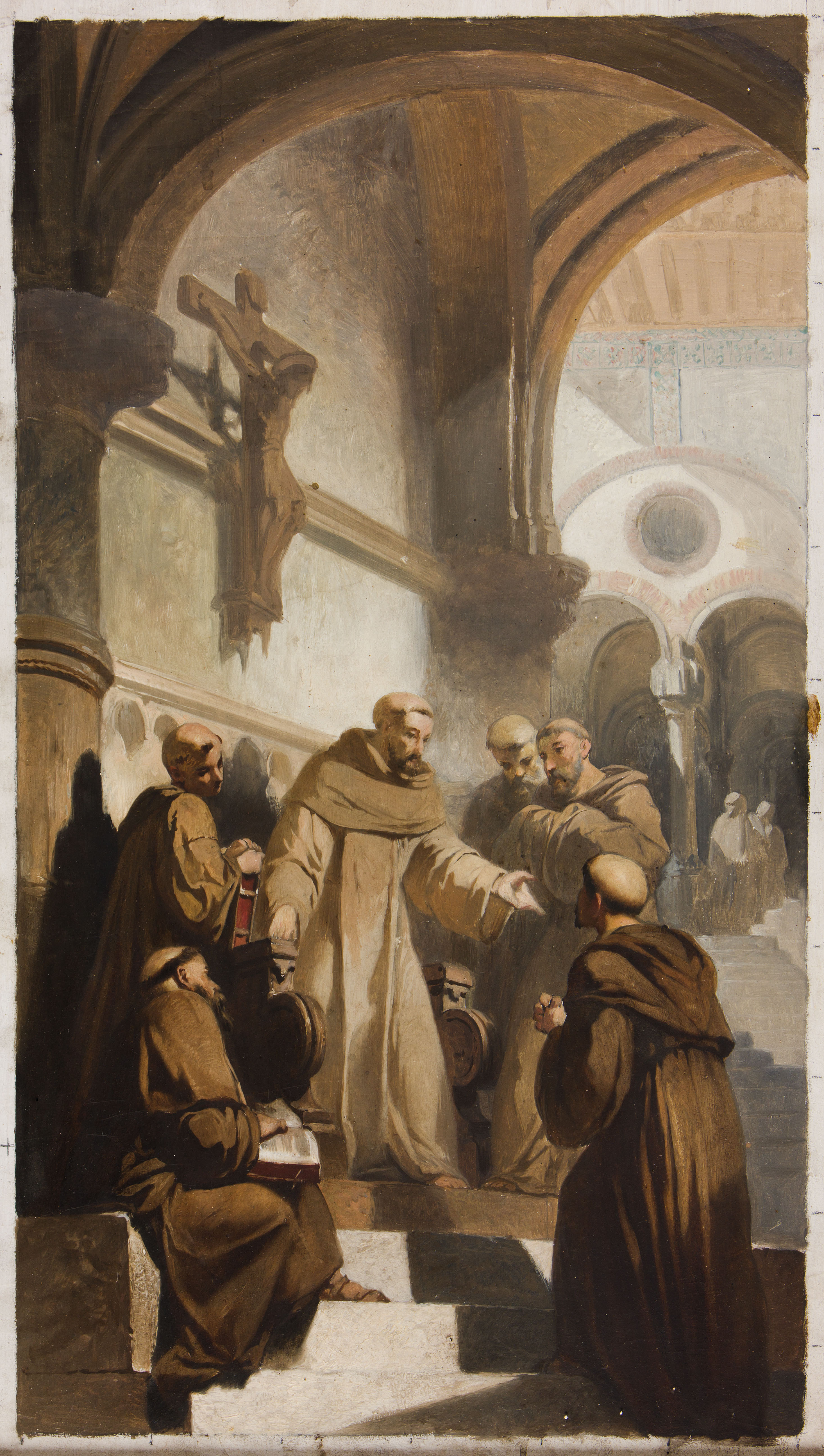 Peinture représentant Saint-Antoine reçu par Saint-François (collection Carpay du musée des Beaux-Arts de Liège)